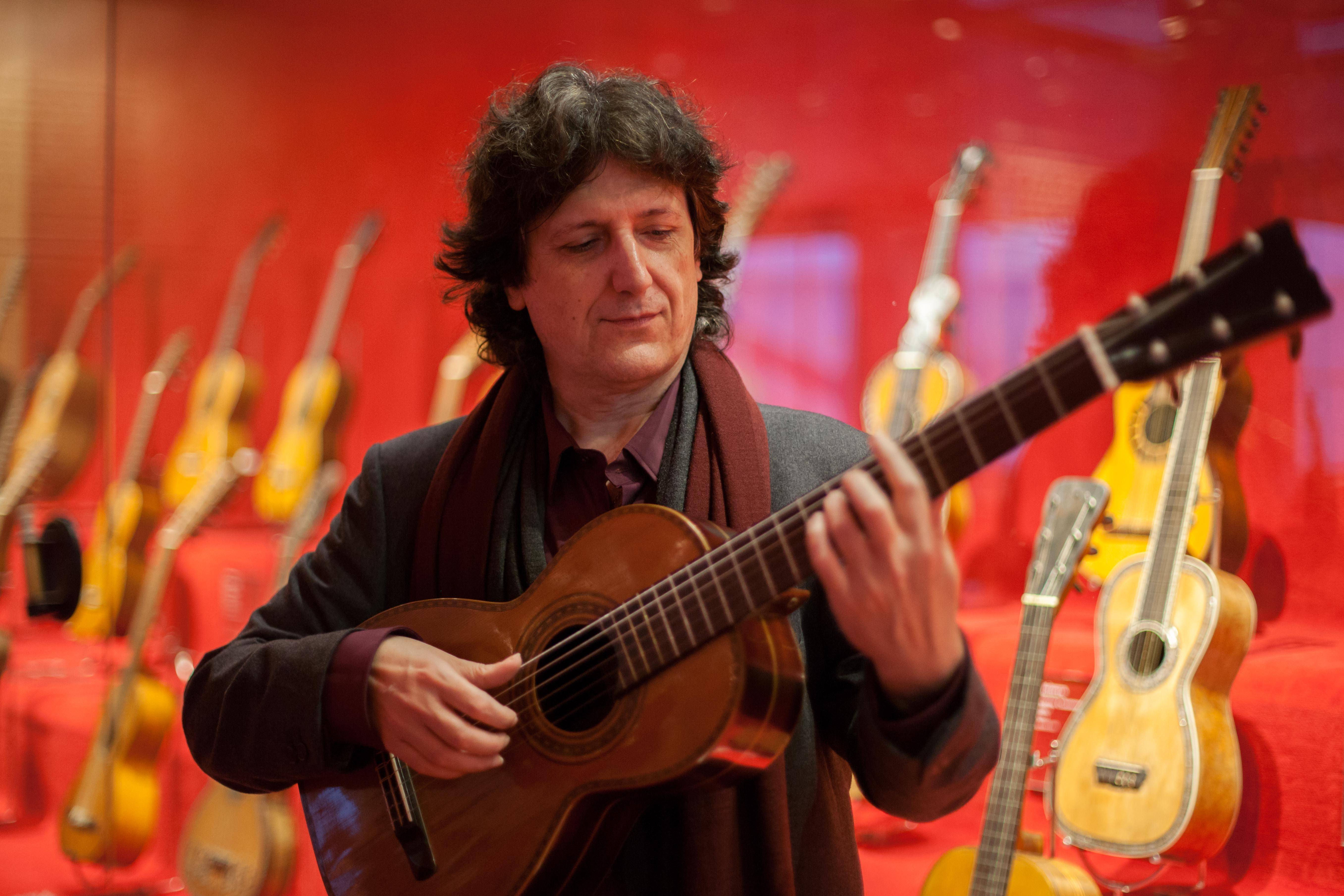 Juan Manuel Cañizares en un visita al Museu de la Música de Barcelon, amb una guitarra Pagés que va pertànyer a Victòria dels Àngels